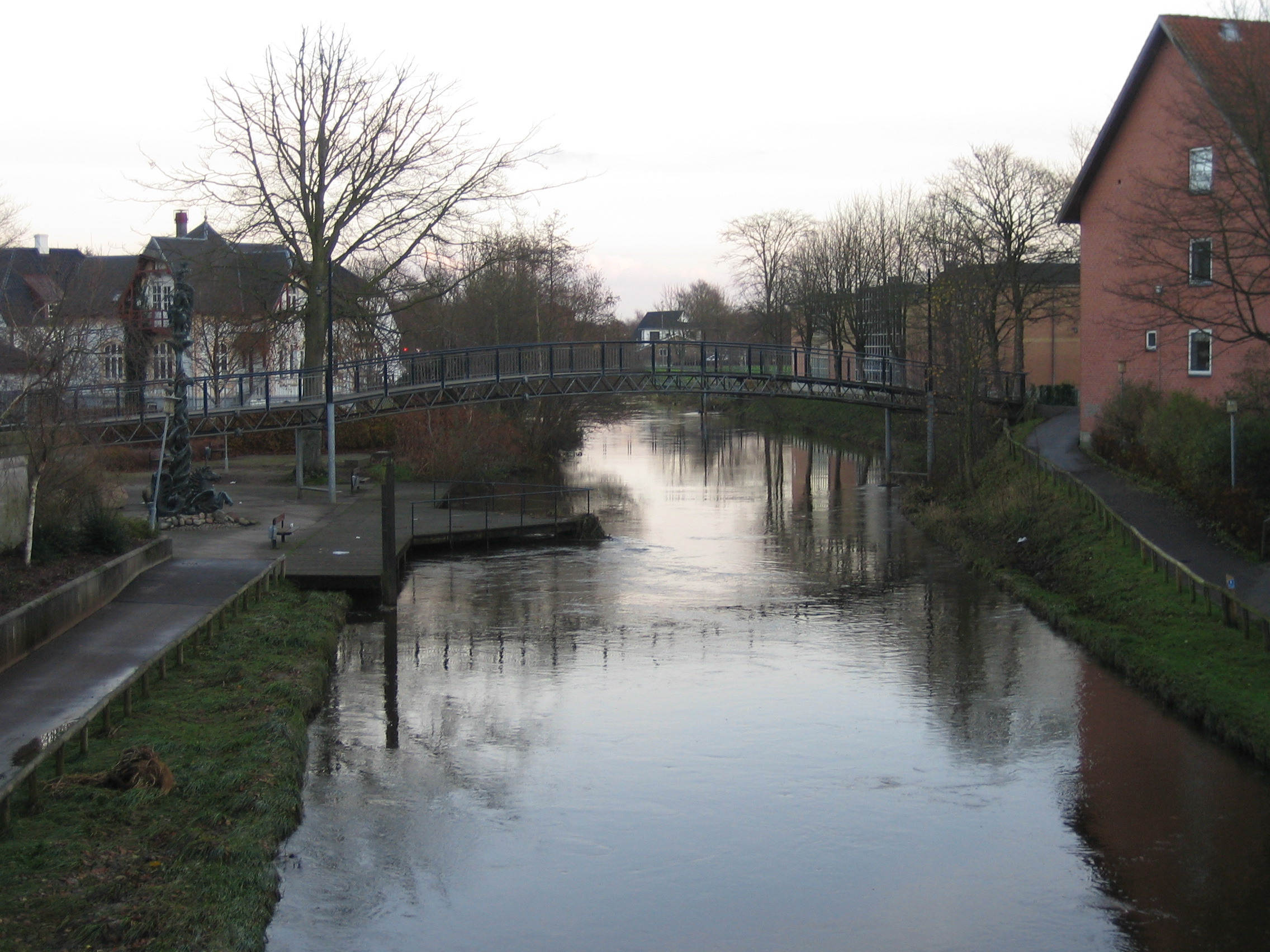 Storeåen i Holstebro